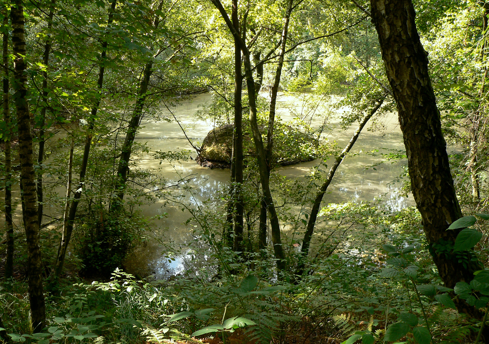 Drususquelle in der Hees, Auslauf mit Schild Naturdenkmal